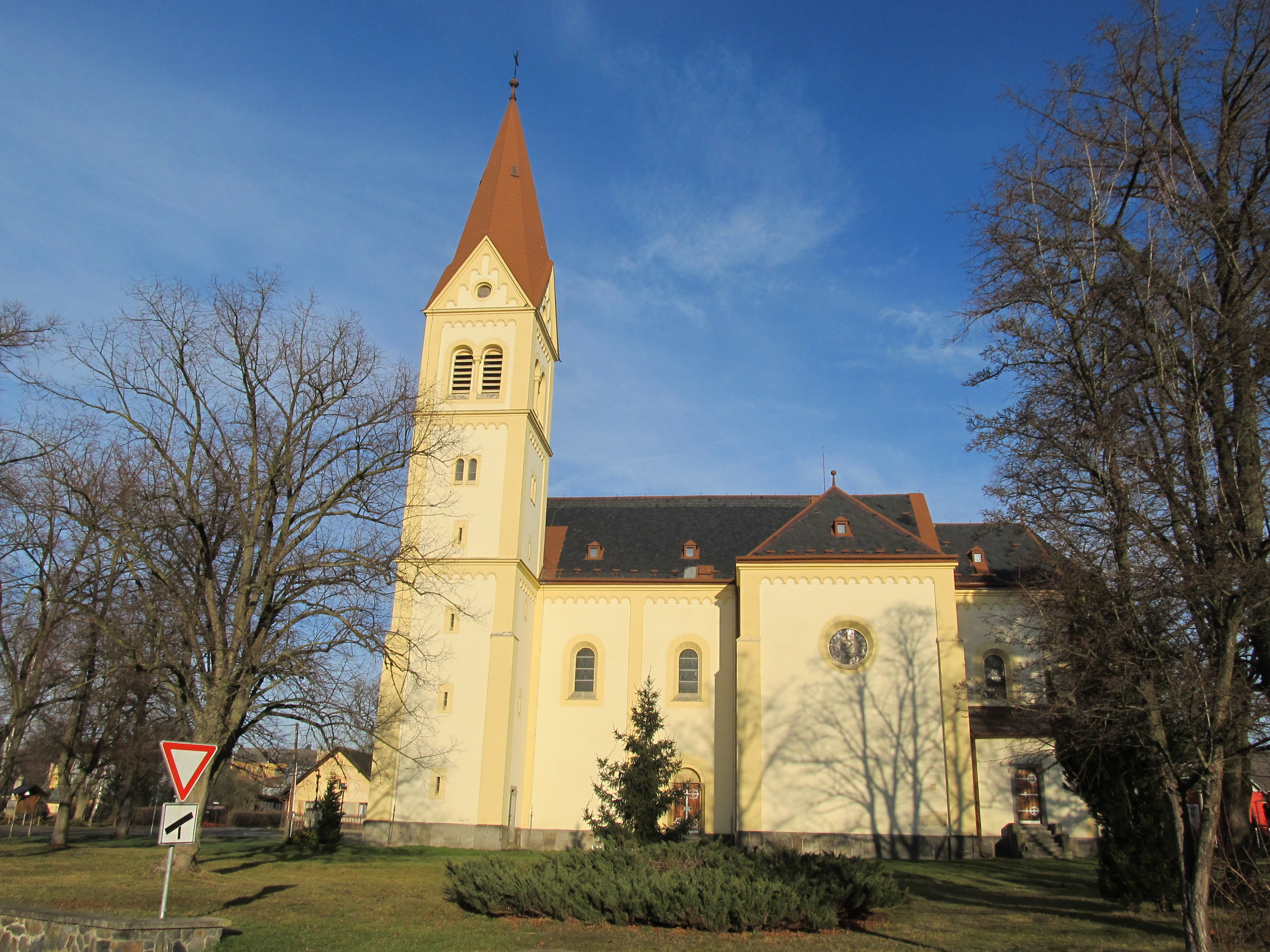 Bezděkov - kostel sv. Václava